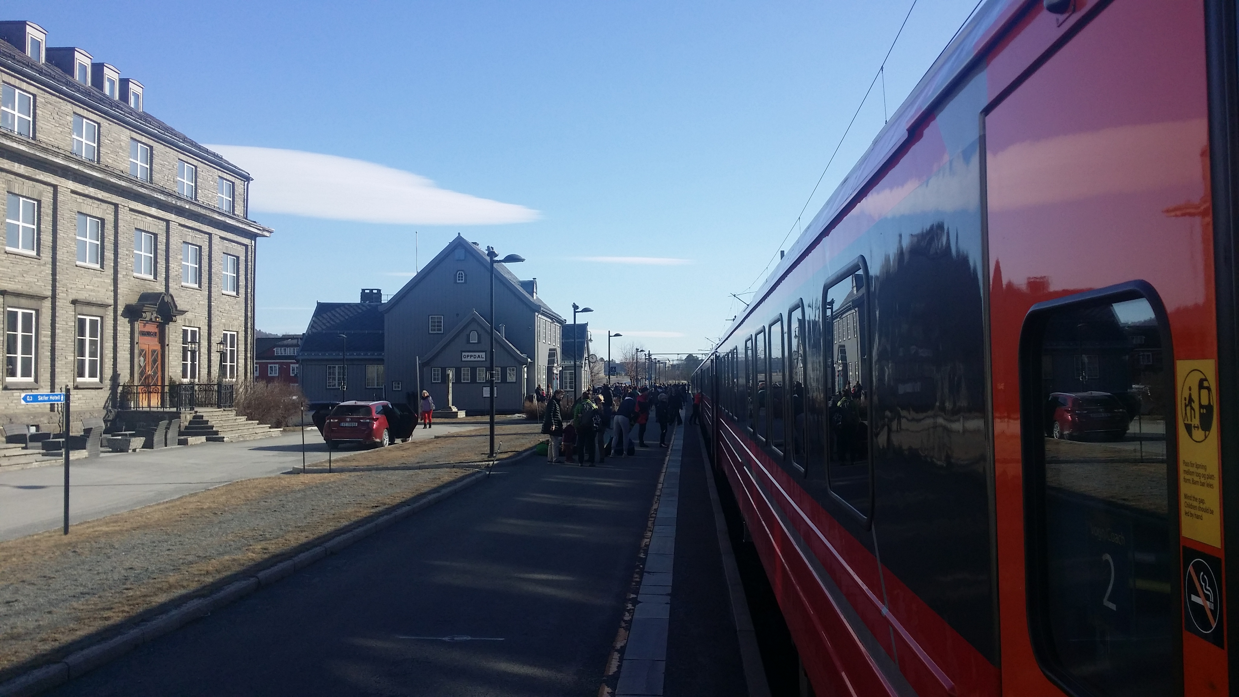 Oppdal stasjon sett sørfra med tog og reisende.